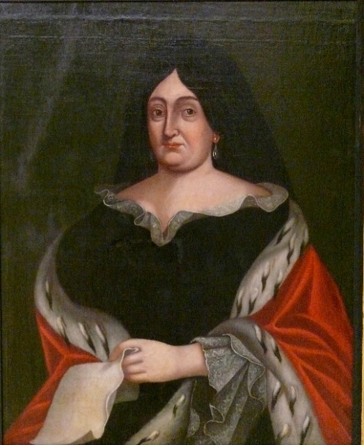 Беларуская (тарашкевіца): Партрэт Кацярыны Радзівіл (Kaciaryna Radzivił) з роду Сабескіх.